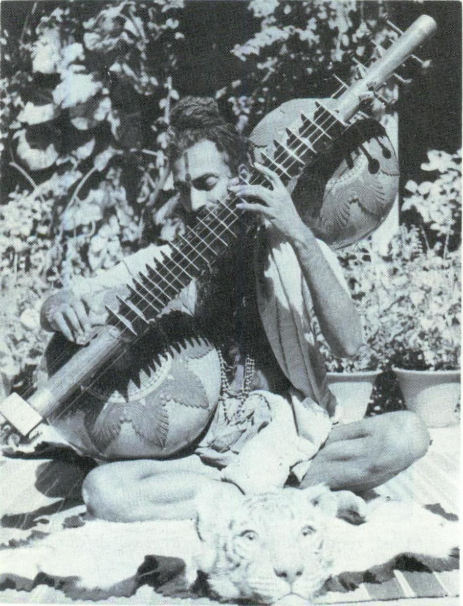 swami veenamaharaj nadayogi dattatreya rama rao parvatikar playing rudra veena